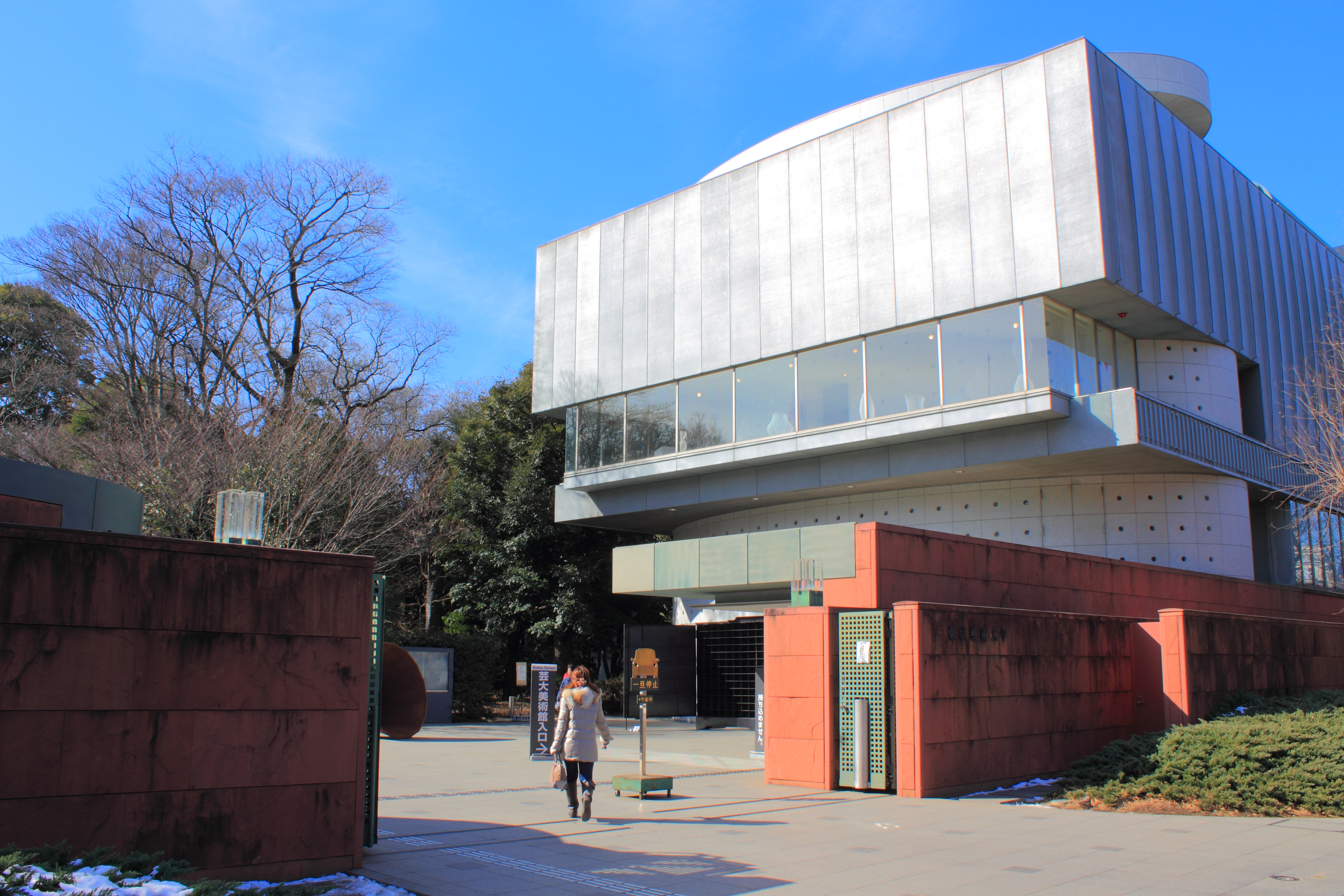 東京藝術大学美術学部正門、および大学美術館（東京都台東区）